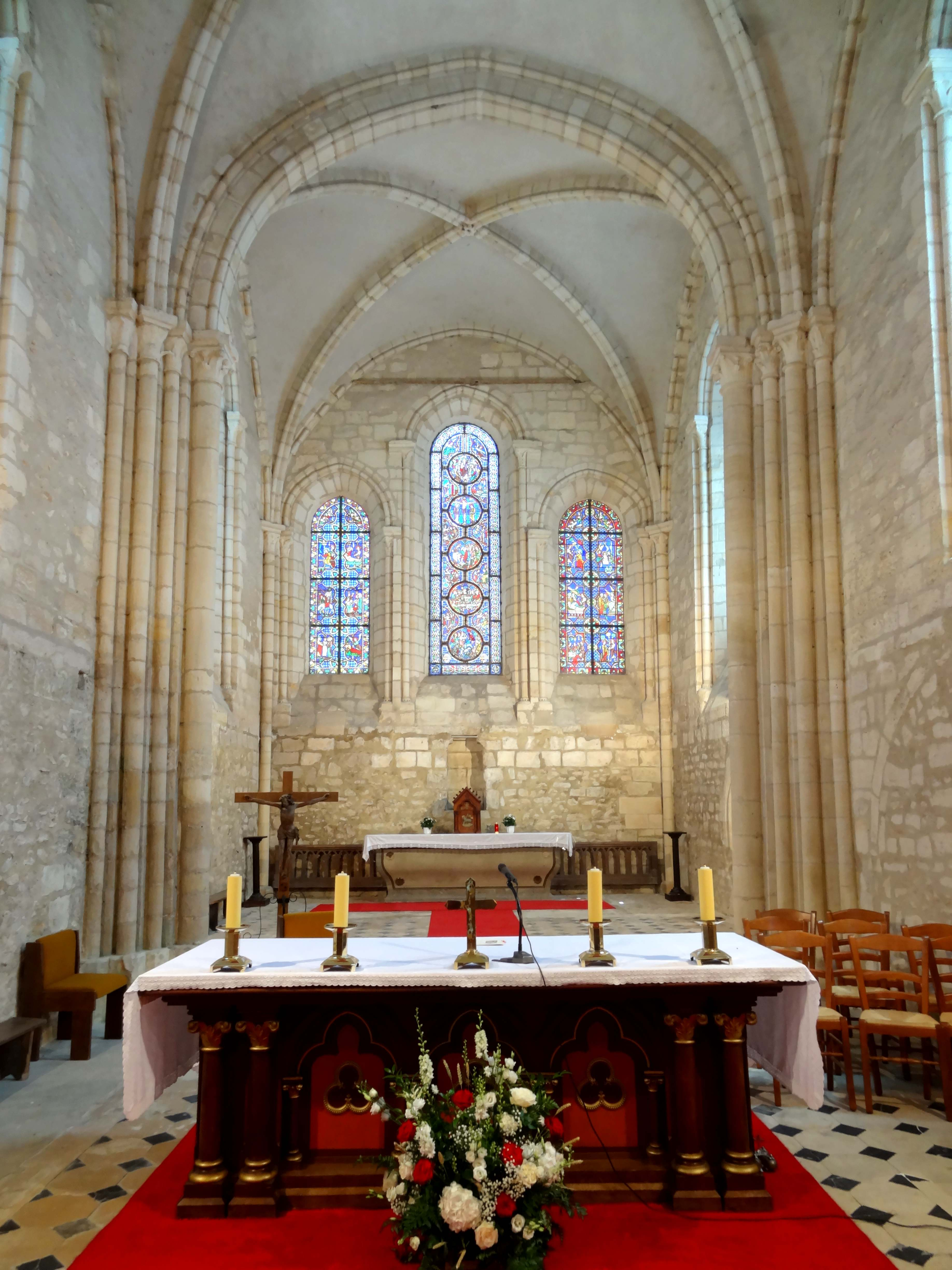 Intérieur de l'église - voir titre.